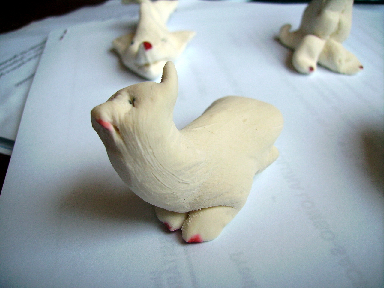 Alfenins produzidos na cidade de Vilas Boas de Goiás, GO.